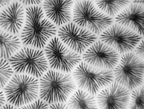 Estructura de los coralitos de Pseudosiderastrea tayami, imágen SEM (microscopio electrónico de barrido)